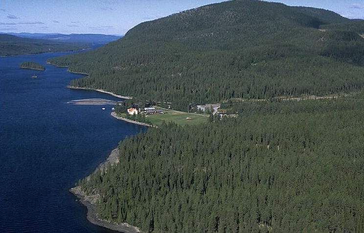 Motiv: Ålviken Nyckelord: Flygbilder, Riksintressen Kategori: Insjömiljöer Ålviken